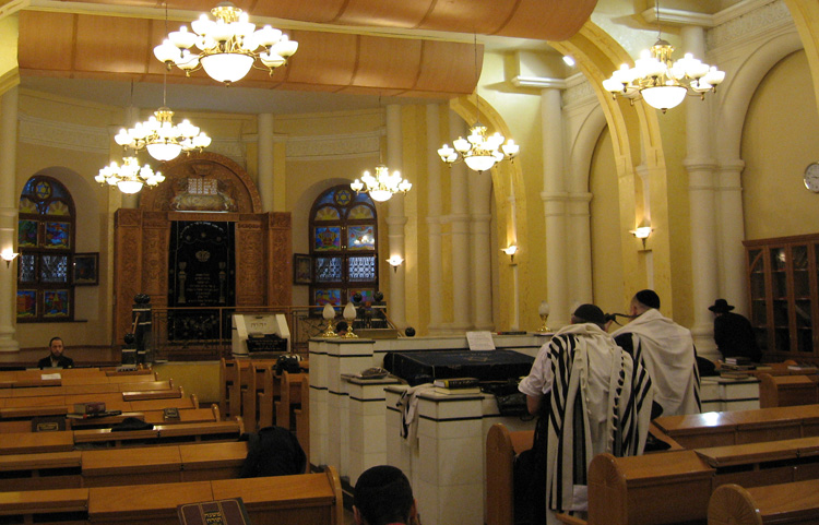 Молящиеся в Главной синагоге Одессы (Еврейская, 25)